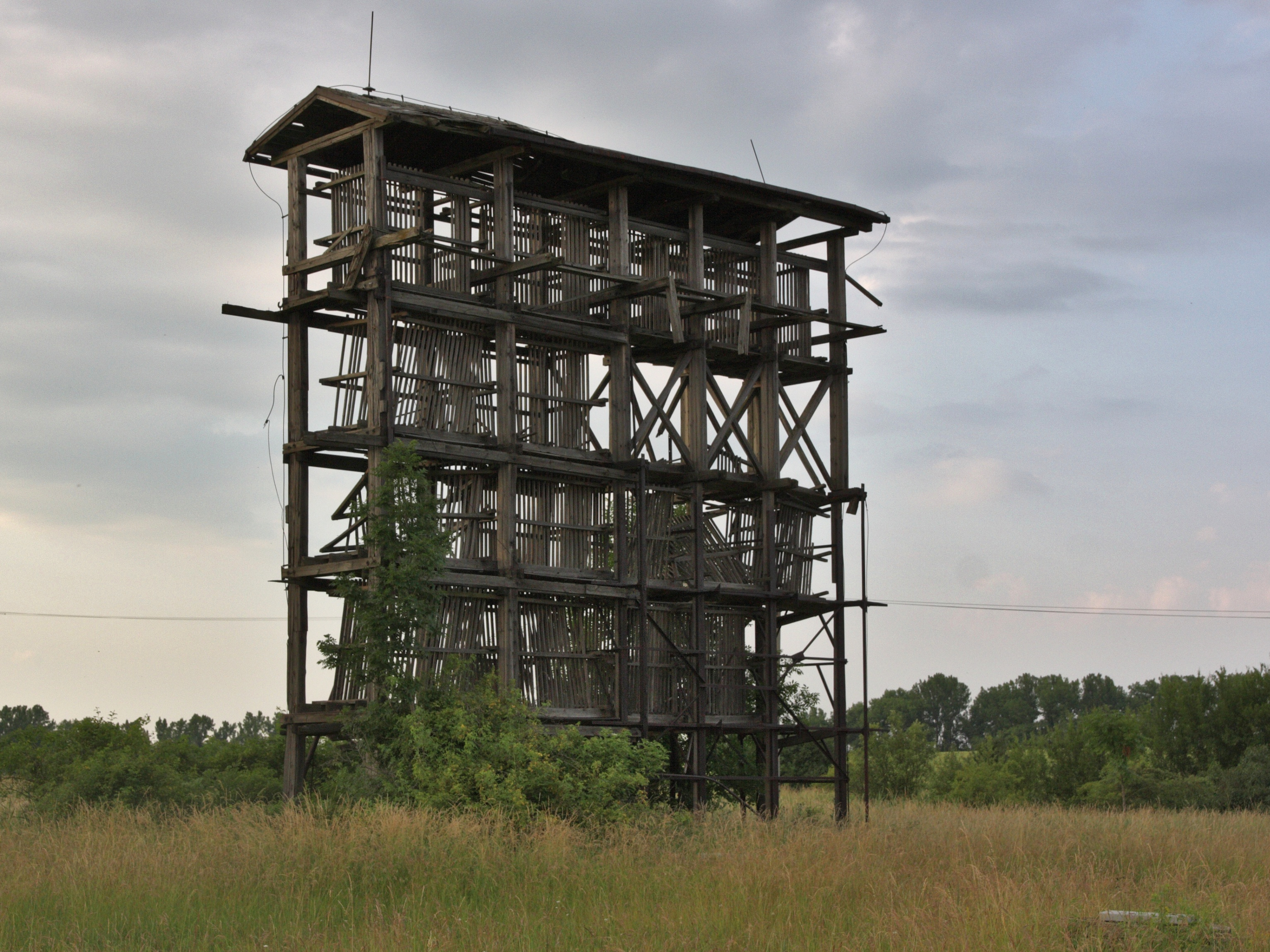 Historická gradační věž v areálu Kalužiny.